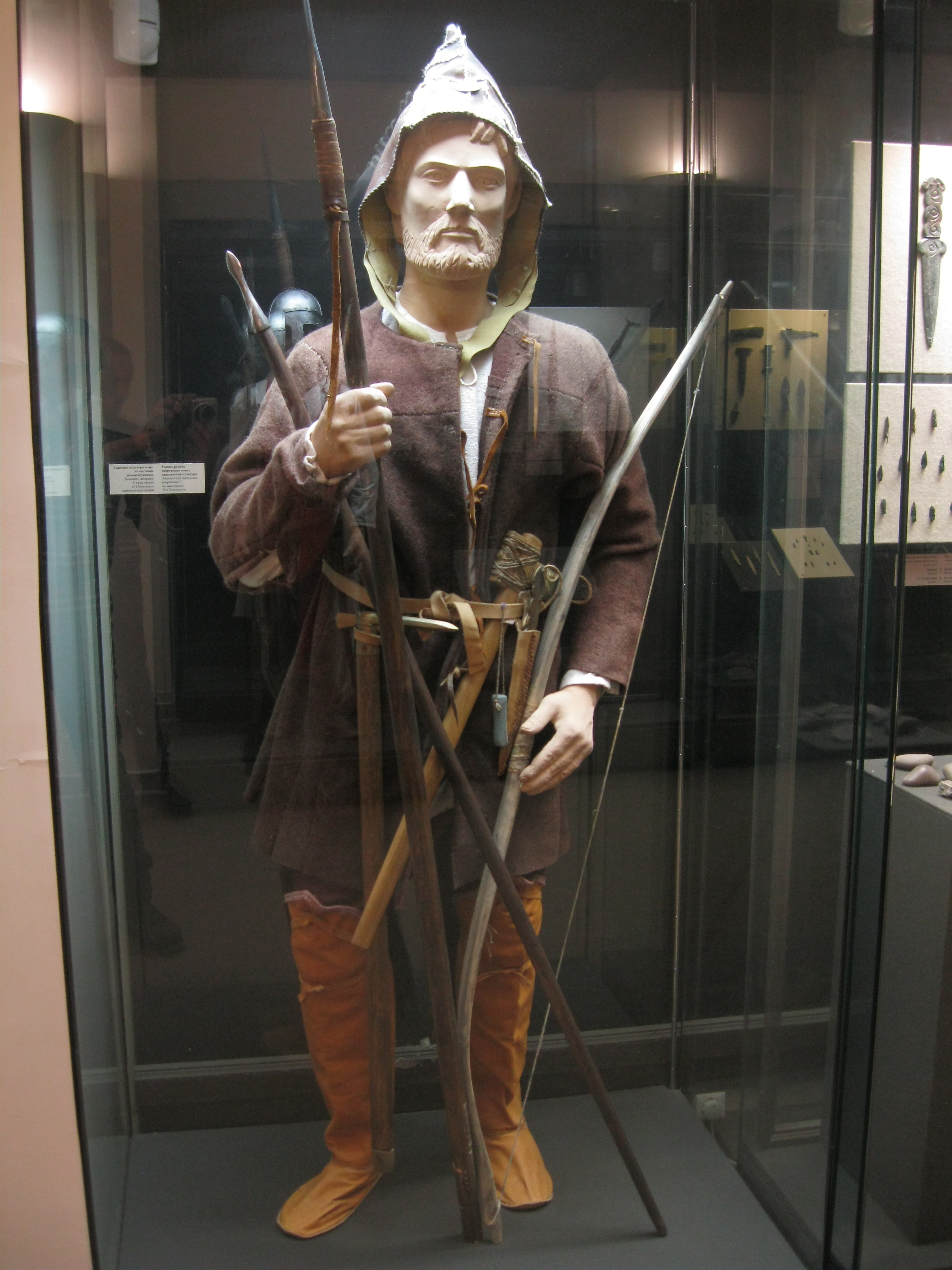 Вооружение воина Ананьинской культуры. Национальный музей Республики Татарстан